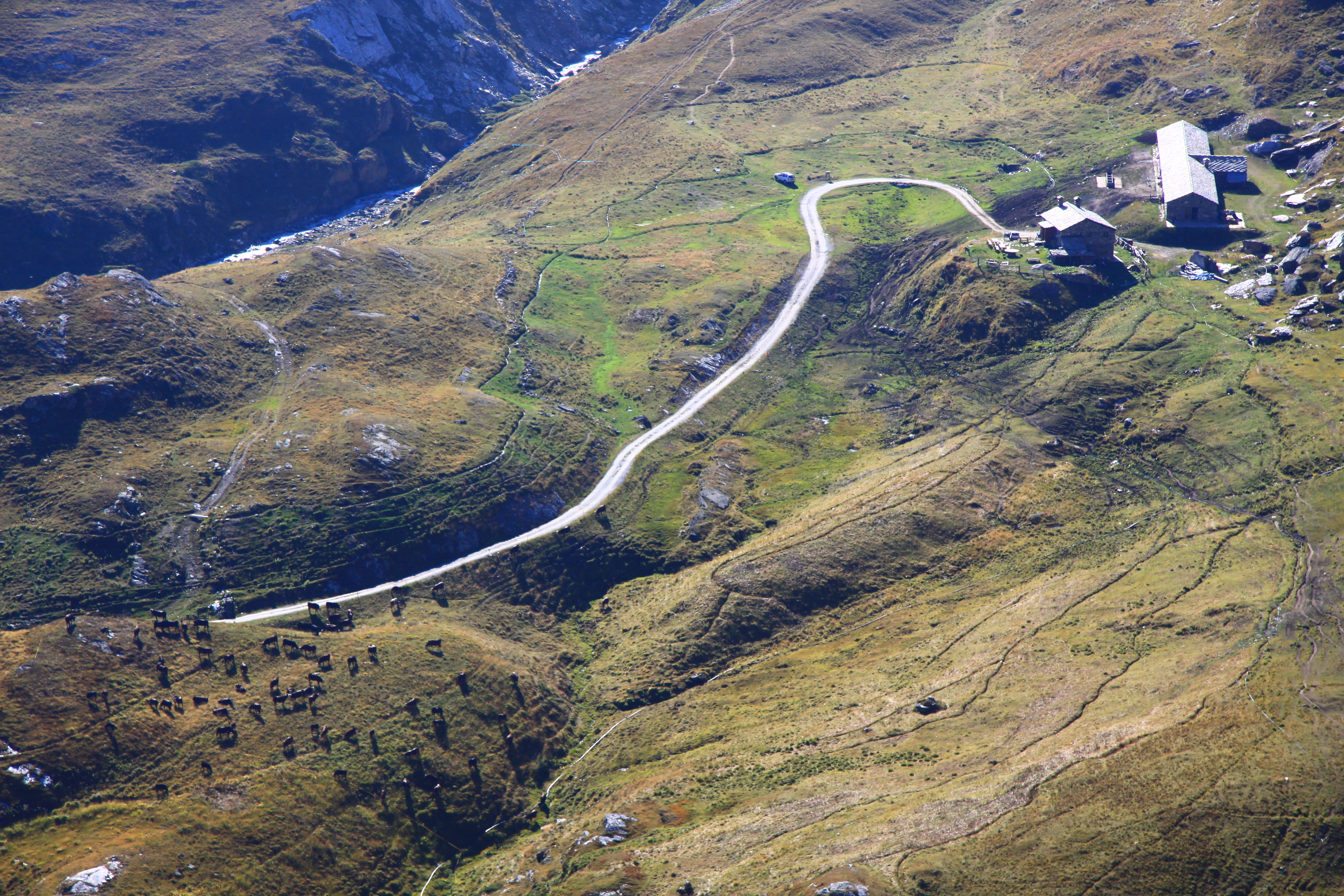 Fotografia realizzata nel contesto del progetto LIFE PastorAlp